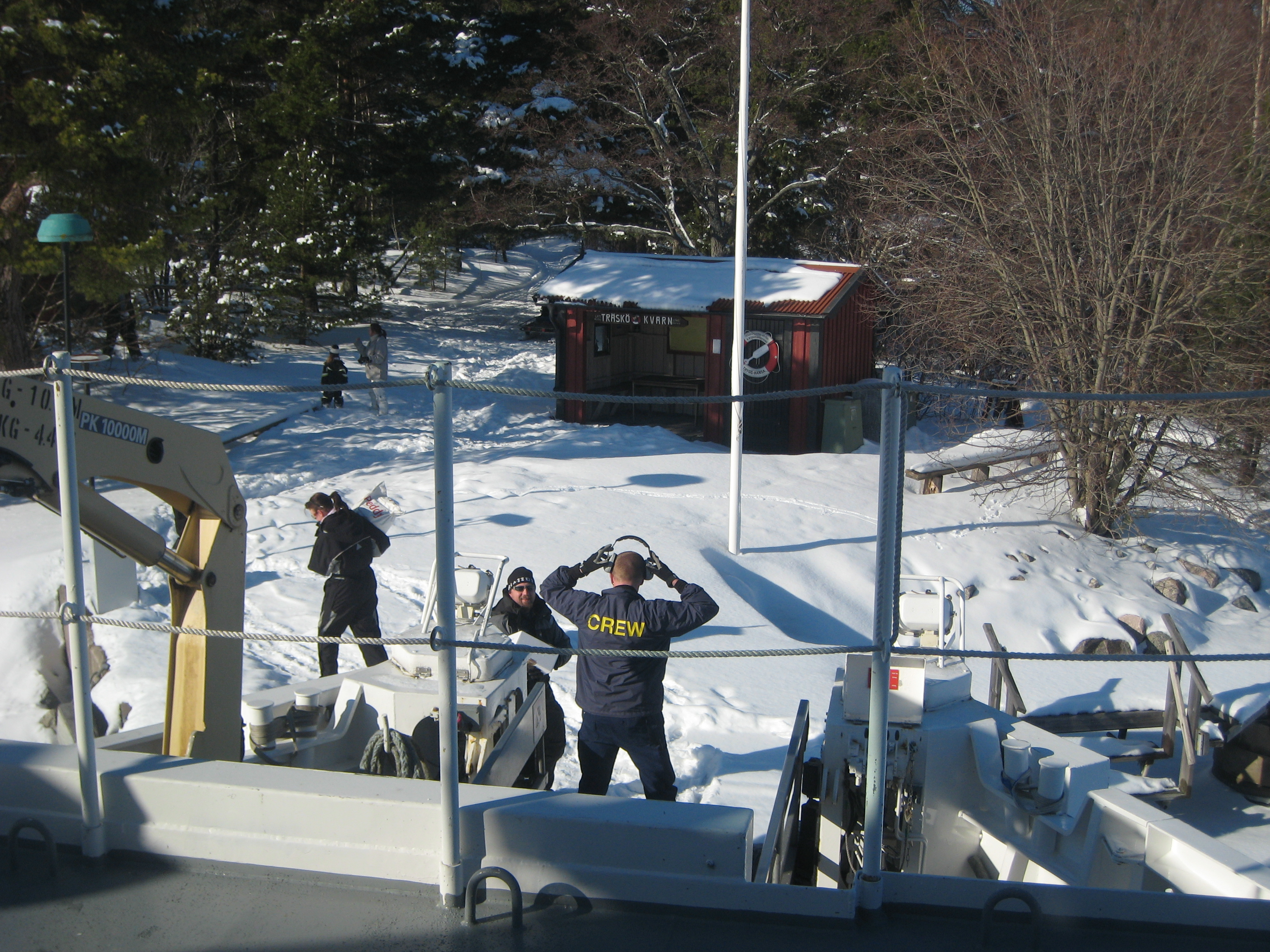 Besättning på M/S Söderarm överlämnar gods till invånarna på Träskön i Stockholms yttre skärgård.